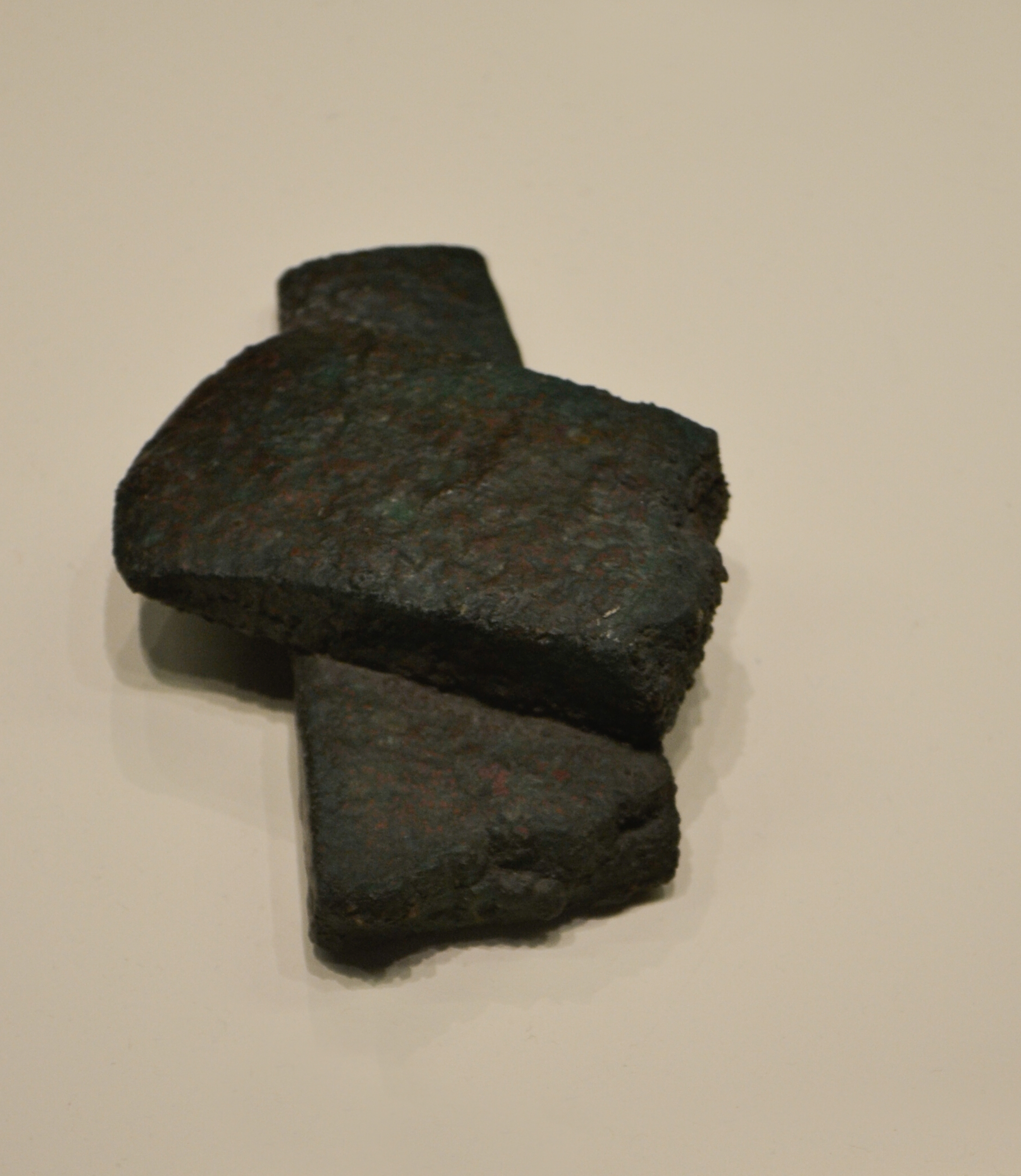 Hacha de bronce fracturada. Neolítico Final-Calcolítico. Procedencia: Almizaraque, Cuevas del Almanzora (Almería). Nº inv. 1984/172/41/33. Museo Arqueológico Nacional de España.